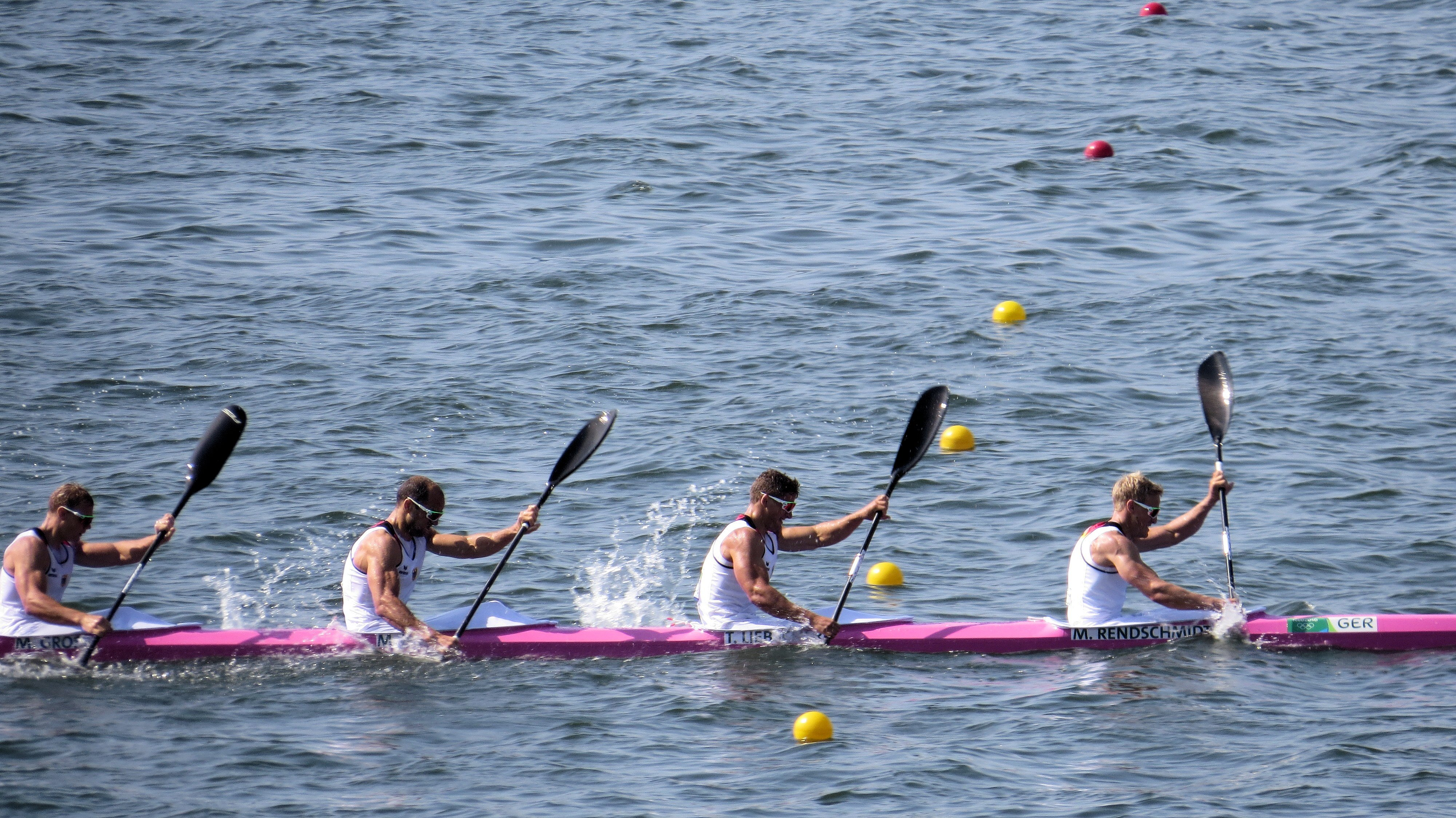 Sx50